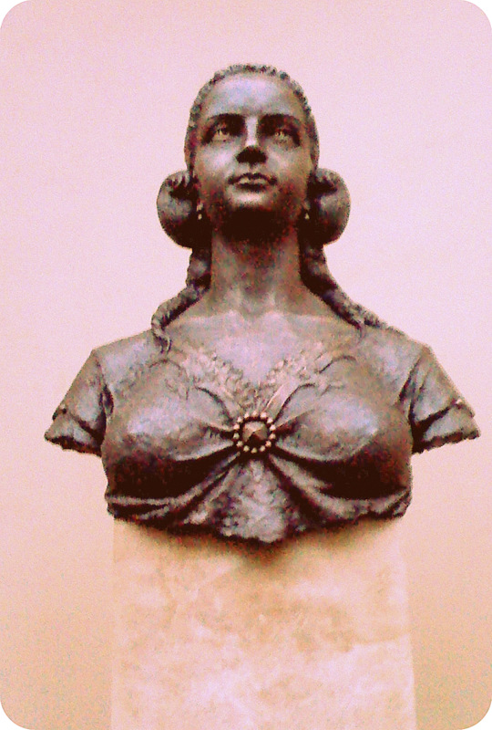 Бюст графини Кристины Чаки (Csáky Krisztina) в Ужгородском замке